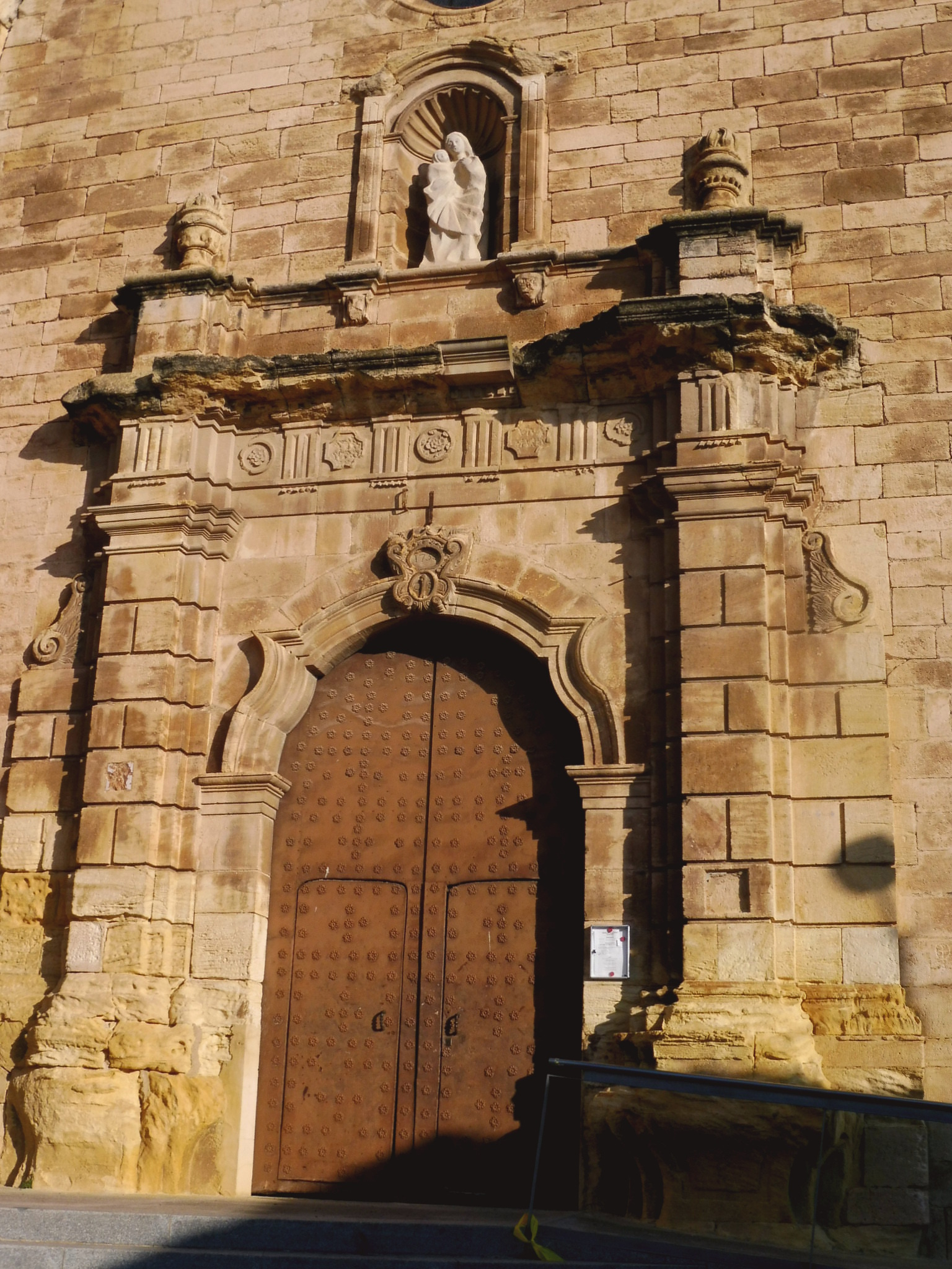 Església parroquial de Sant Miquel d'Os de Balaguer: portada